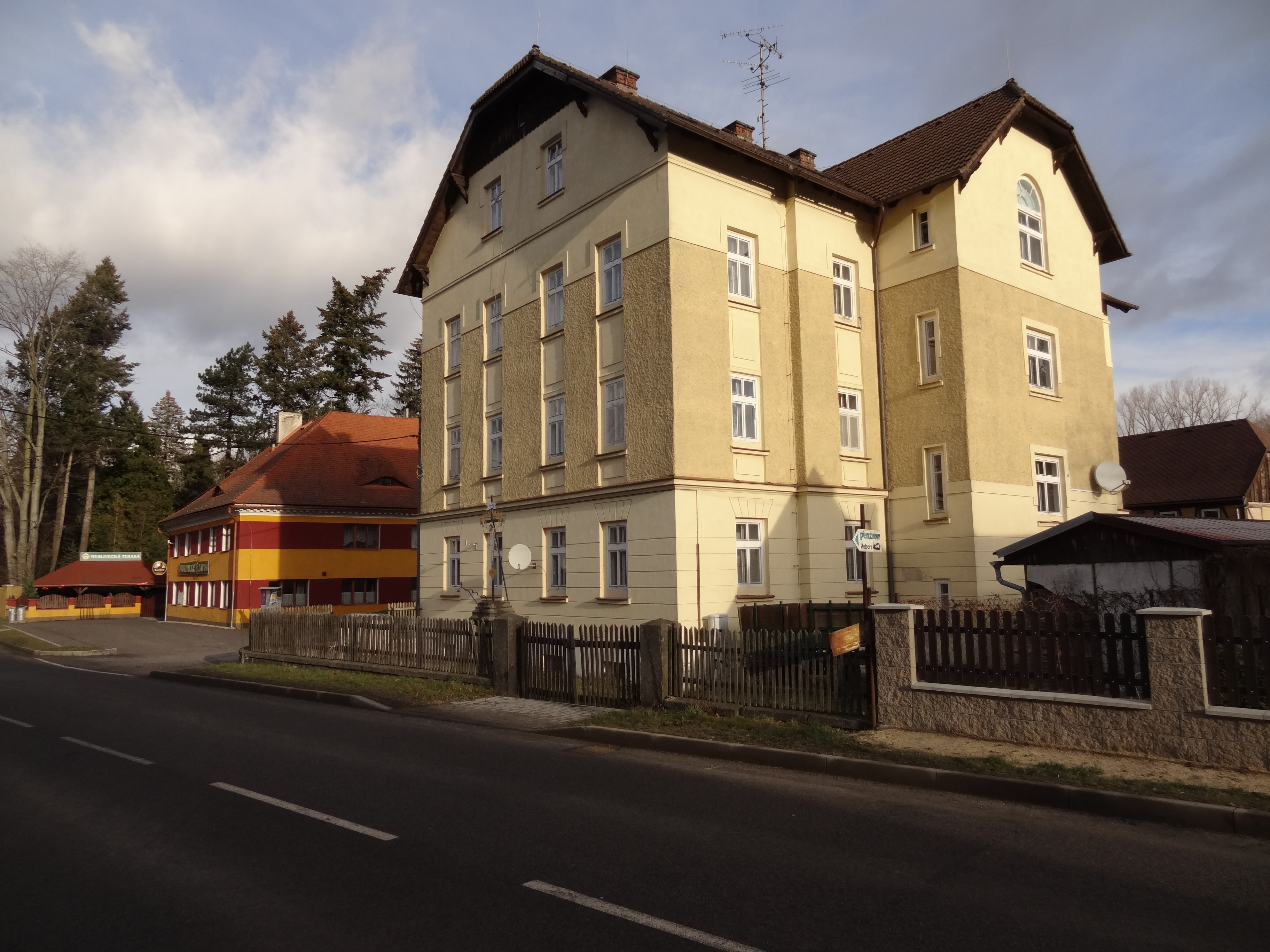 Dům čp. 313 s restaurací, Hejnická 313, Raspenava.